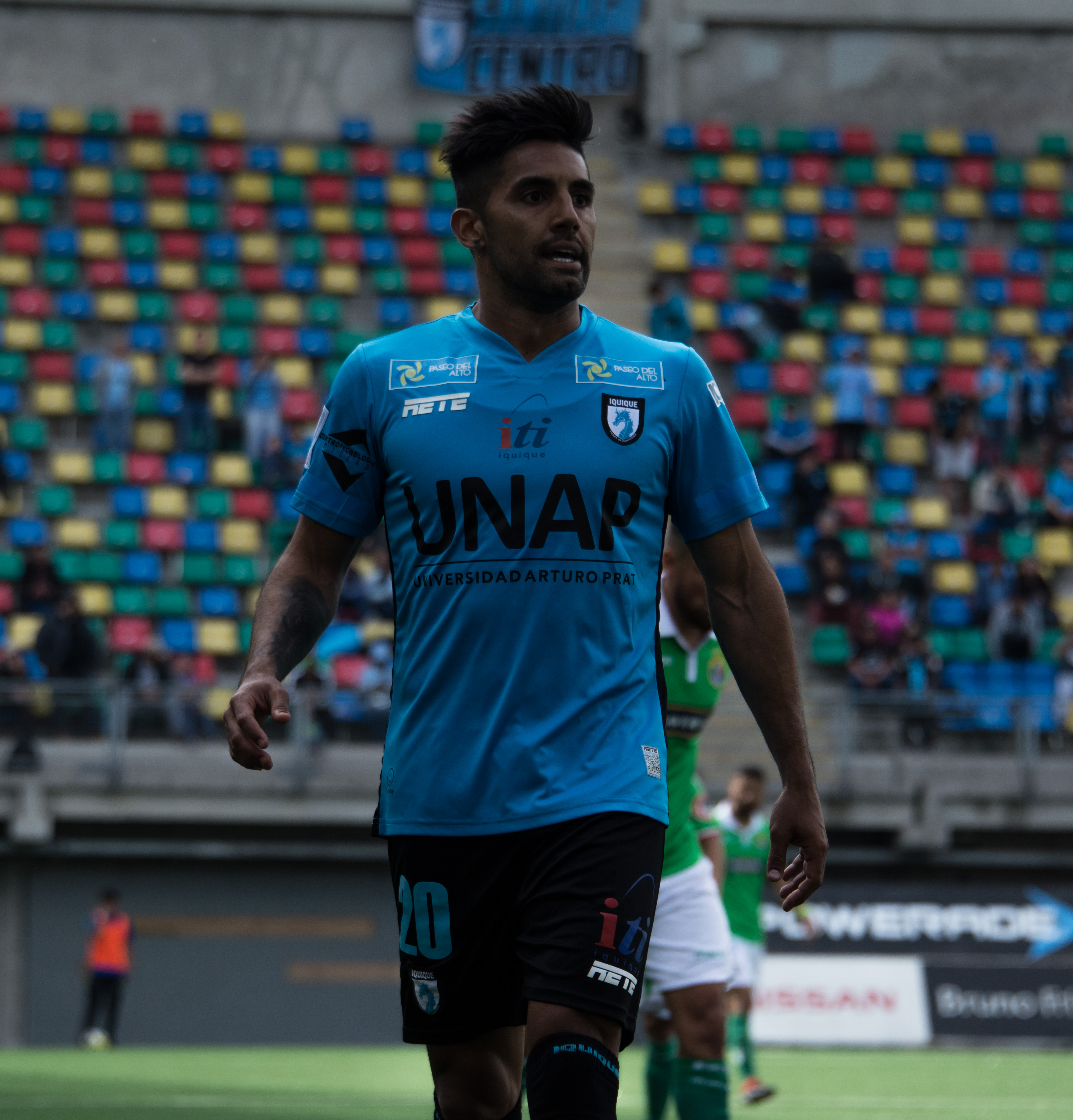 Gonzalo Bustamante, Audax Italiano v Deportes Iquique, Estadio Bicentenario de La Florida, La Florida, Santiago, Chile